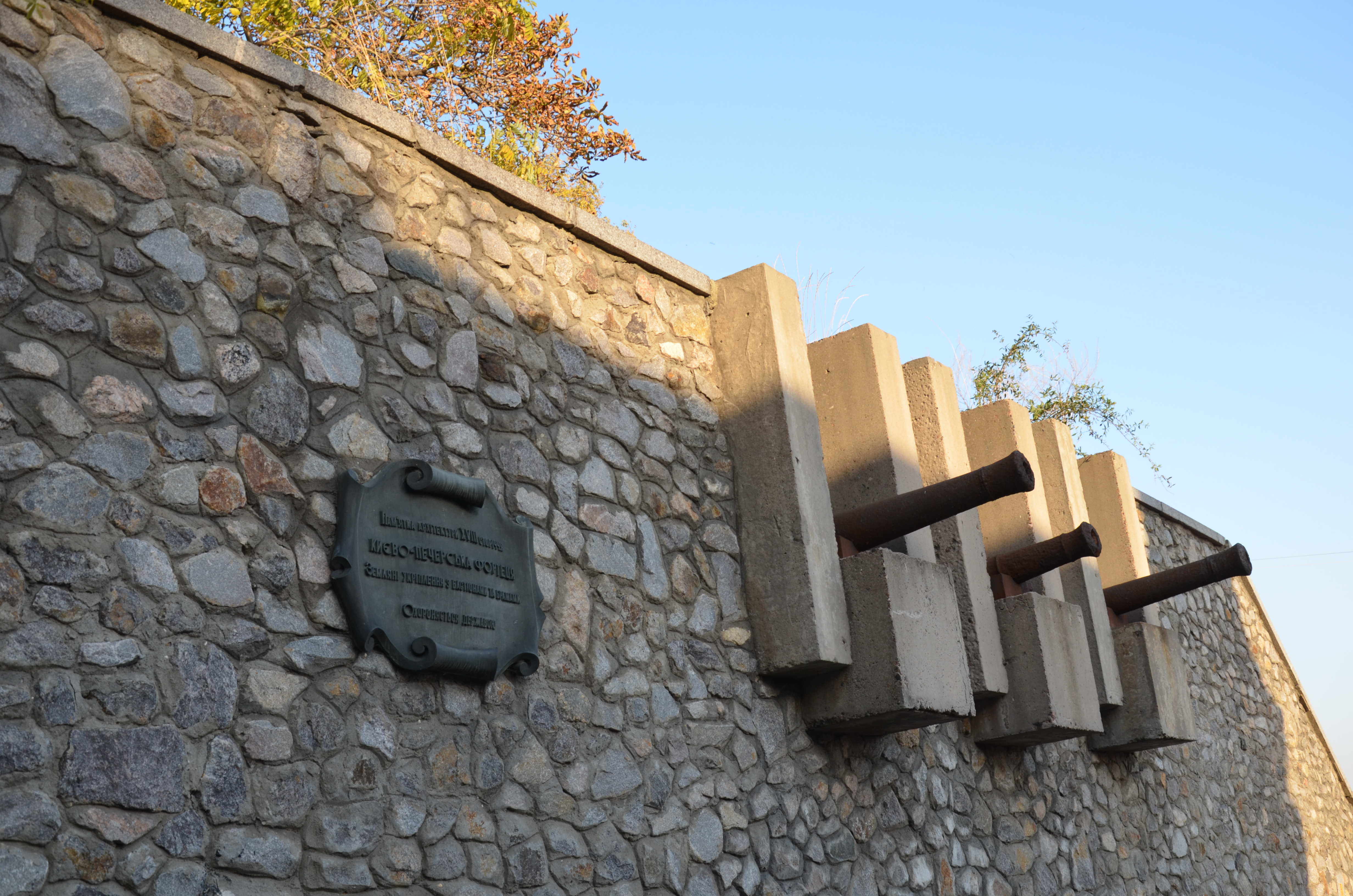 Брама Московська верхня (Земляний вал), Київ, вул. Лаврська, 25